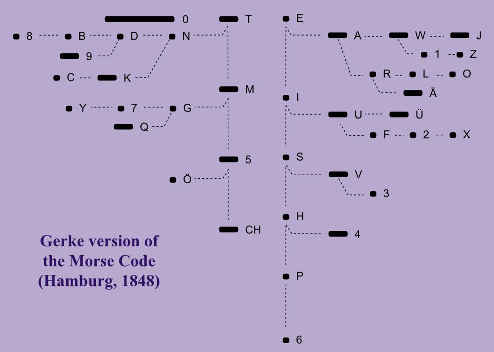 Morse Code van F.C. Gerke